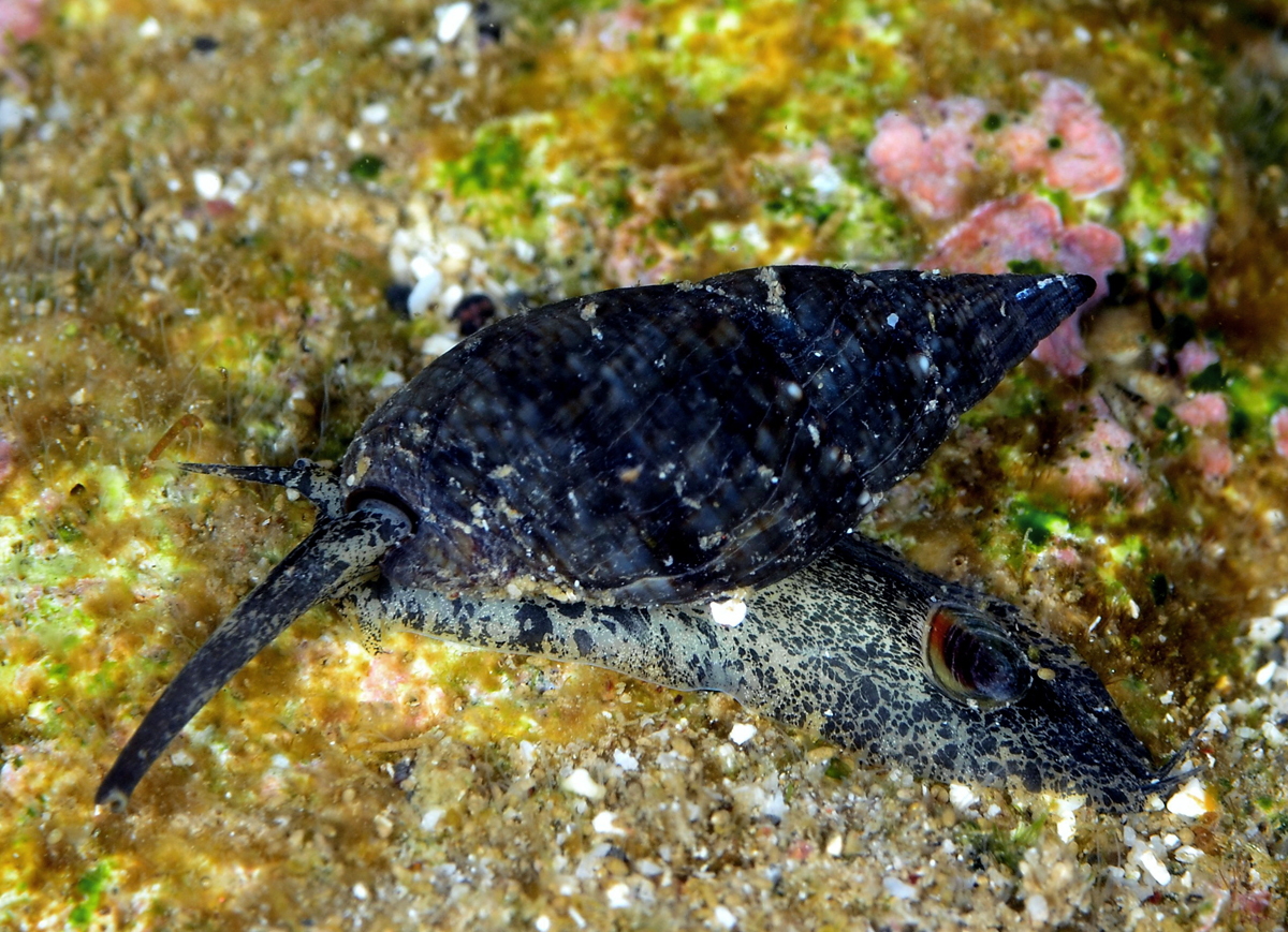 Nassarius reeveanus à la Réunion.